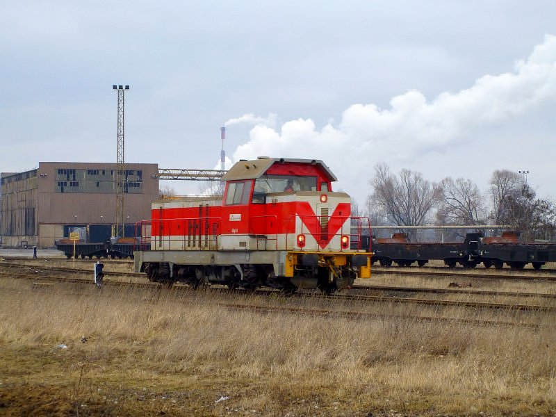 Zmodernizowany spalinowóz 6Dg-03 należący do przedsiębiorstwa ISD Huta Częstochowa manewruje na terenie Huty Częstochowa.